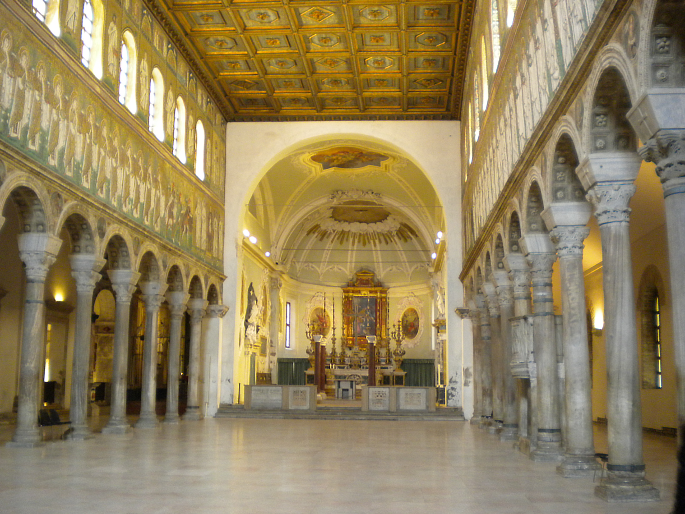 Basilica di Sant'Apollinare Nuovo - MIBAC This is a photo of a monument which is part of cultural heritage of Italy.